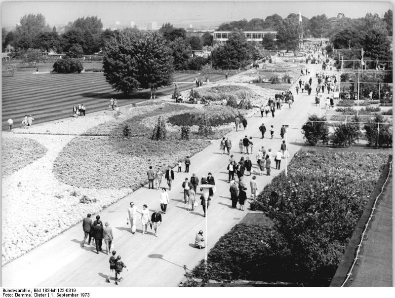 Erfurt, Gartenbauaustellung der DDR ADN-ZB Demme 1.9.1973 Erfurt: Gartenbauausstellung der DDR Blick auf die Anlagen der iga.